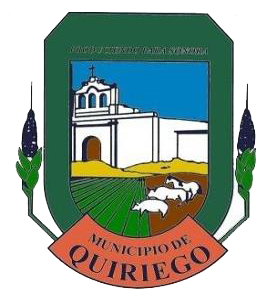 Escudo del municipio sonorense.